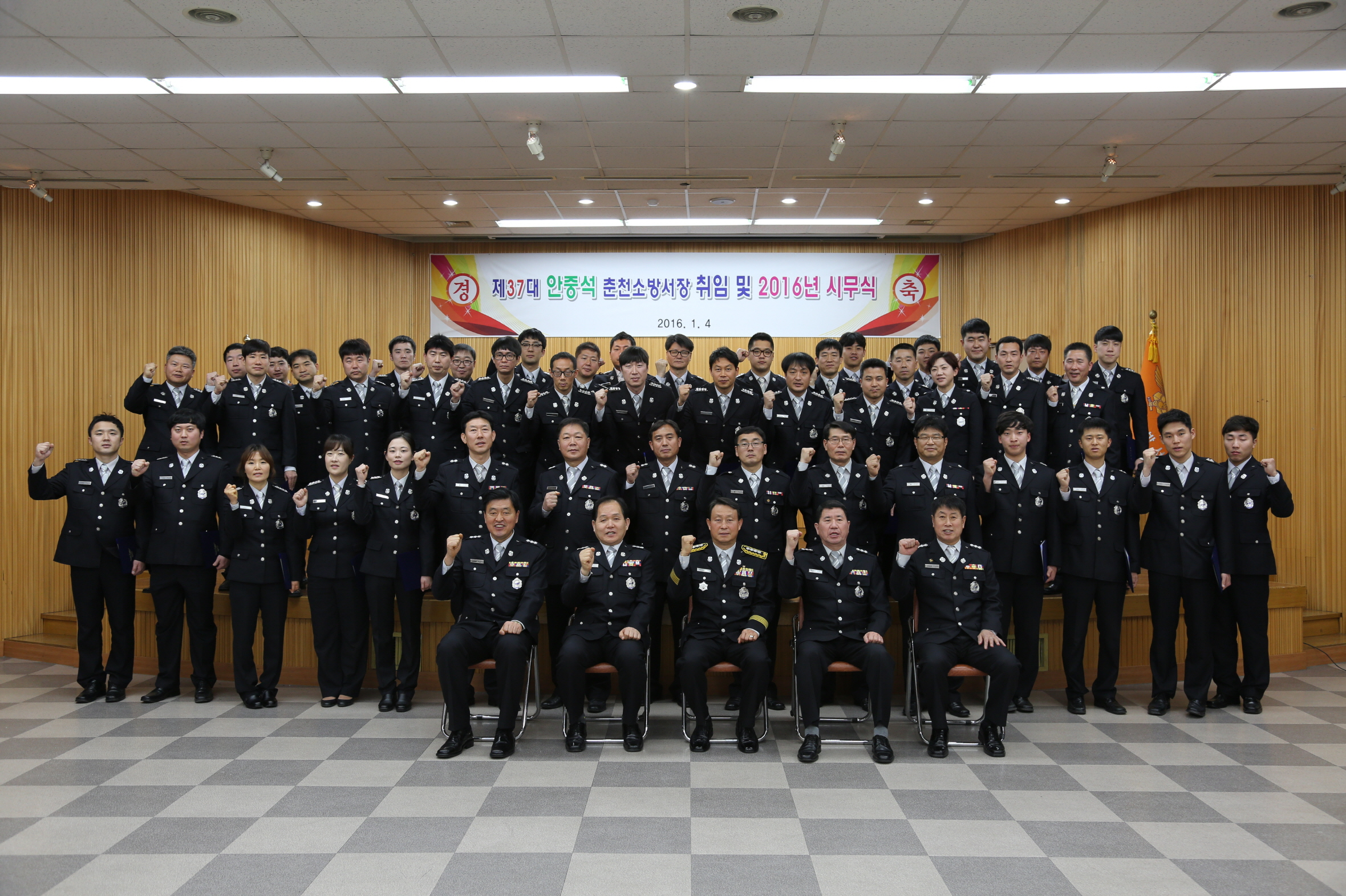 2016년 1월 강원도 춘천시 춘천소방서 제37대 안중석 춘천소방서장 취임 및 2016년 시무식